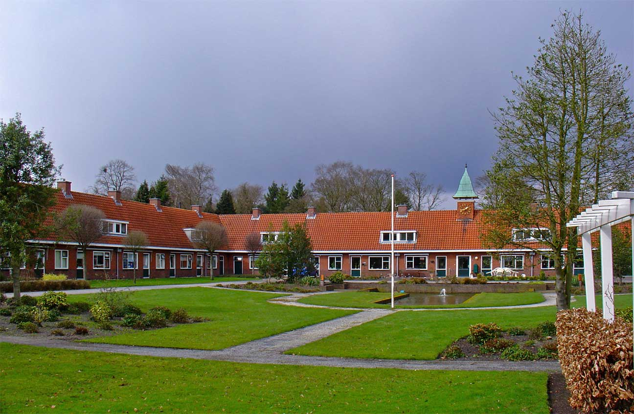 Het Hofje aan de J.F.H. Meijerstraat in Stadskanaal